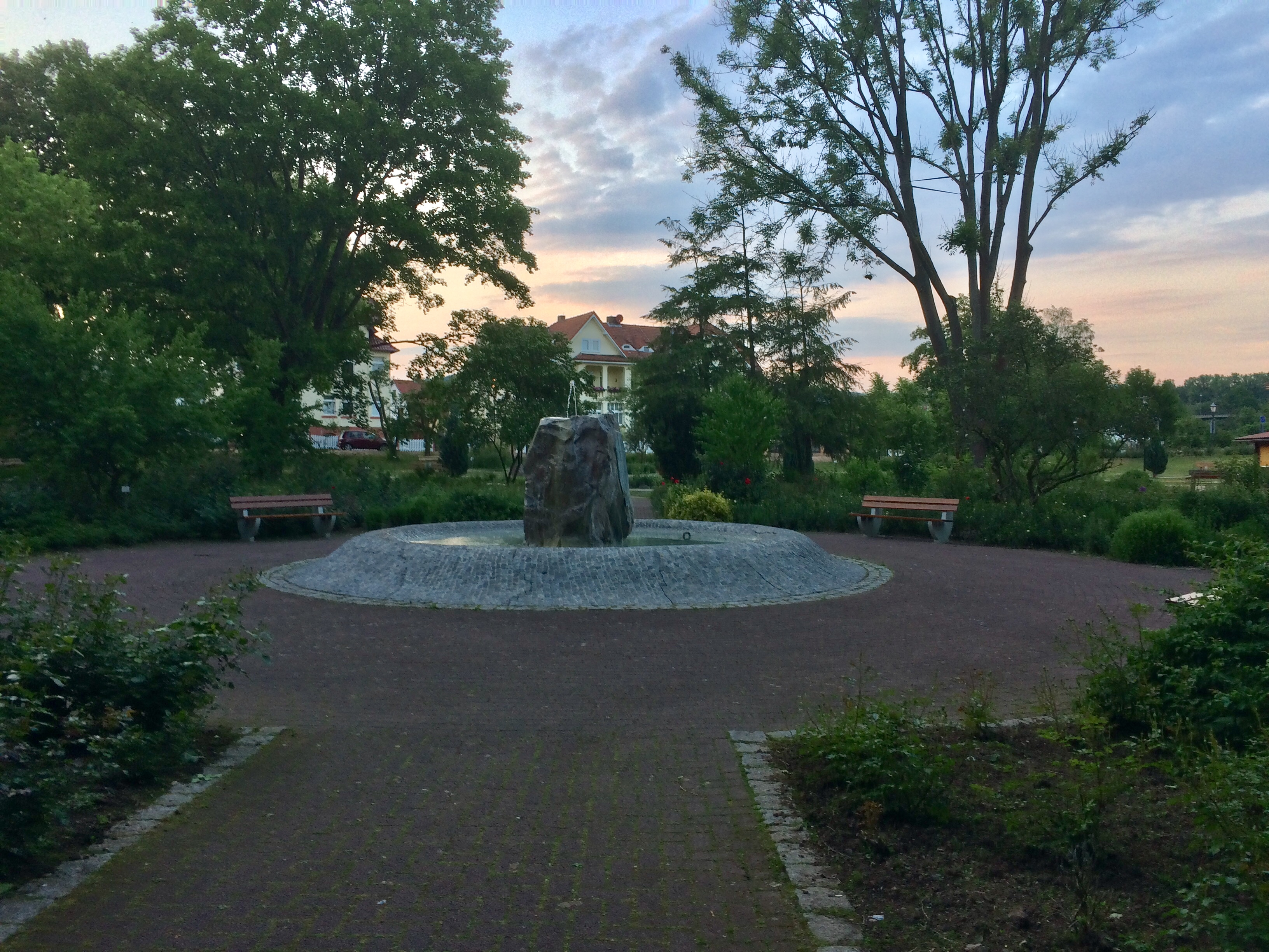 Kurpark in Bad Sooden-Allendorf 2018